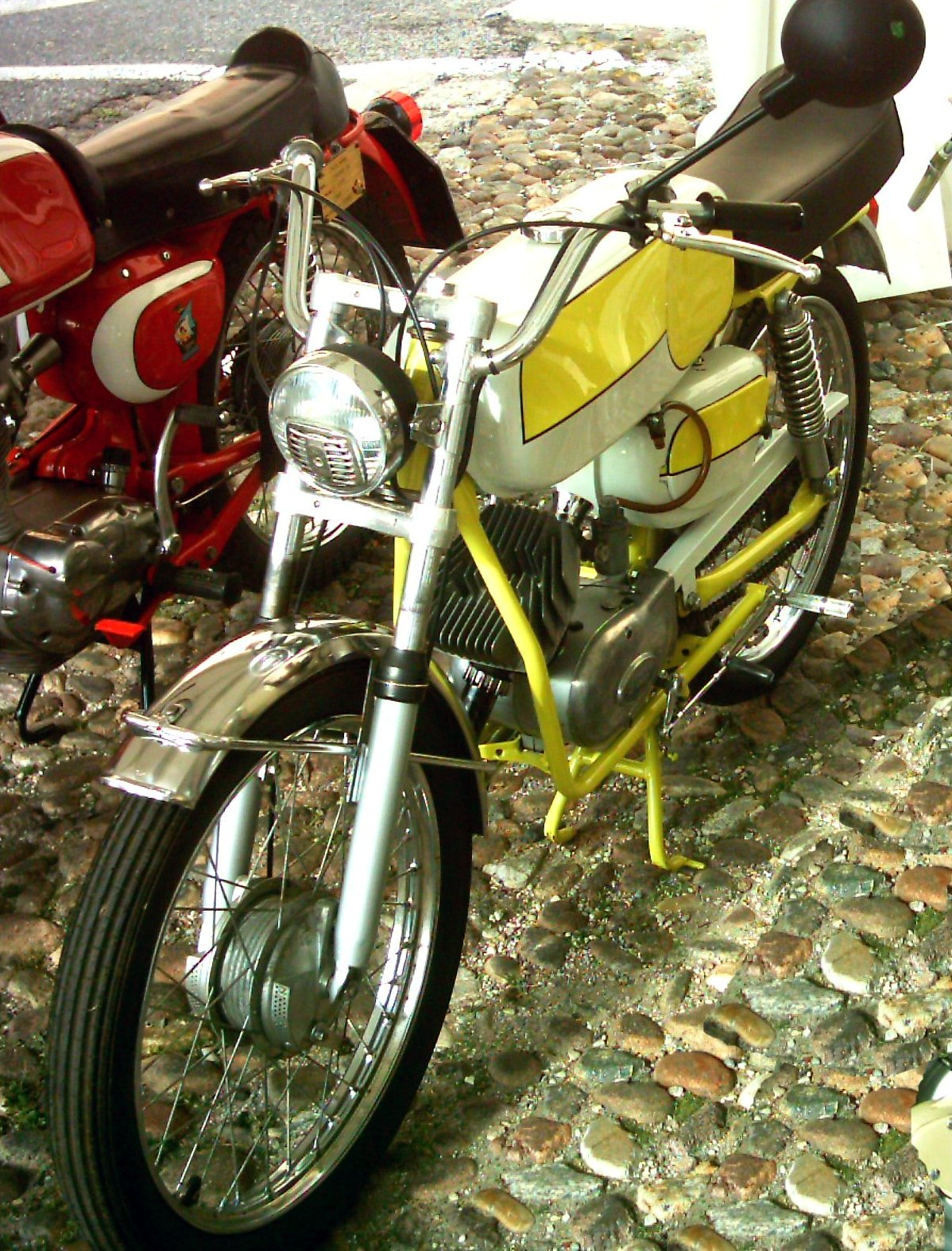 Romeo 50 Super Sport del 1970 fotografata al Raduno Moto Storiche di Medole nel 2006